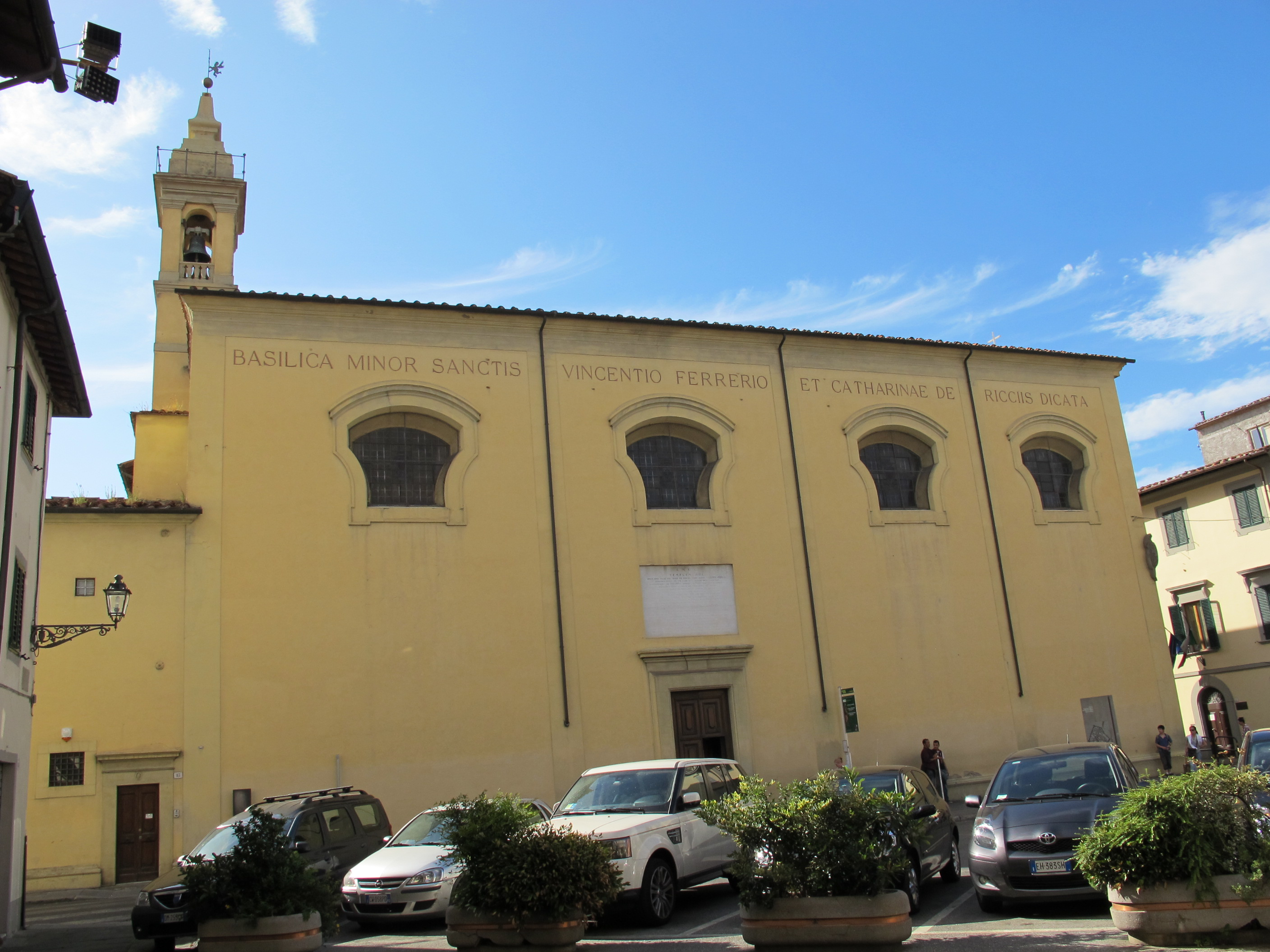 Basilica di santa caterina dei ricci, prato